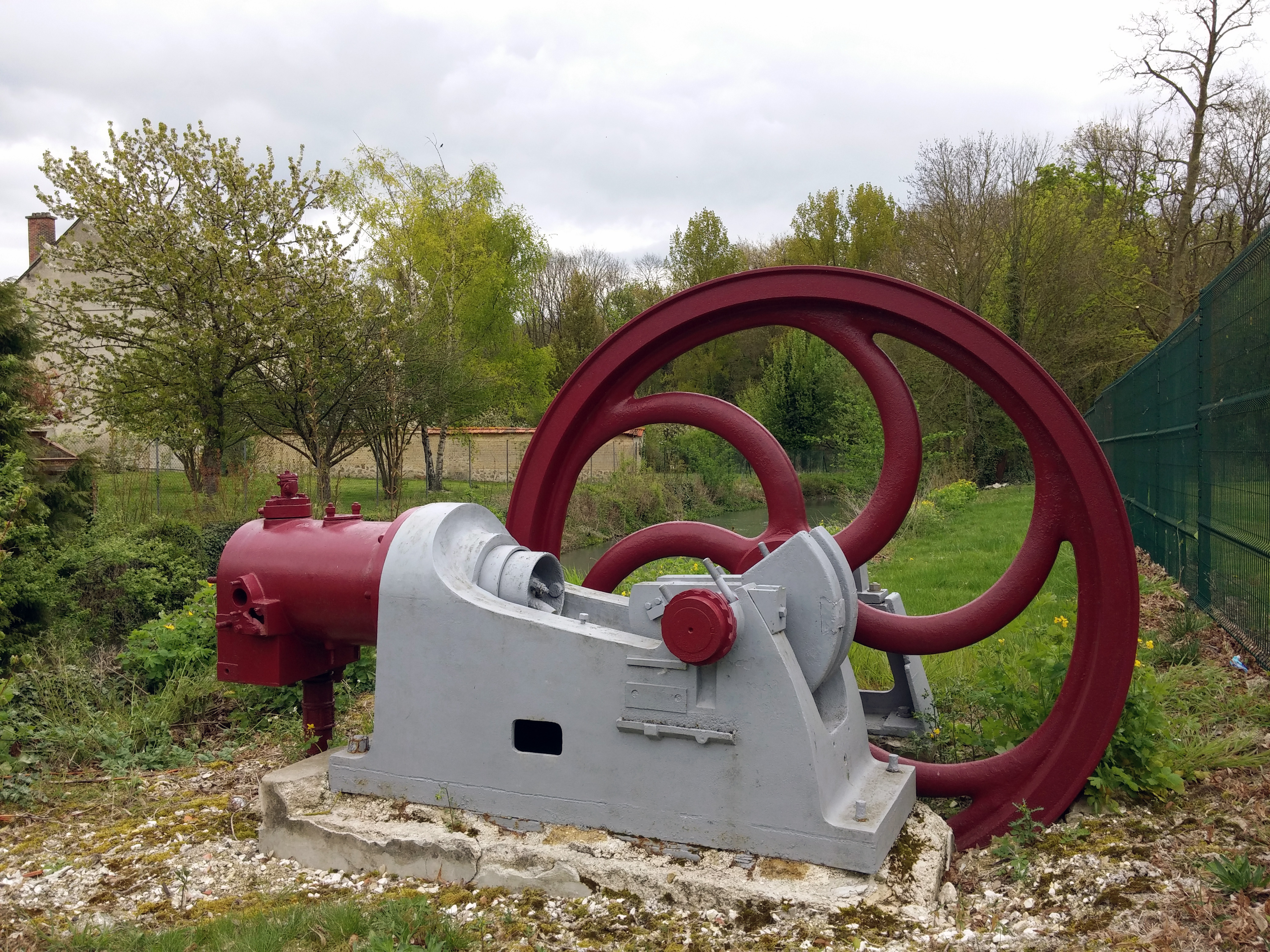 Le moteur à gaz pauvre de modèle National de l'ancienne brasserie d'Isles-sur-Suippe, place de la brasserie.